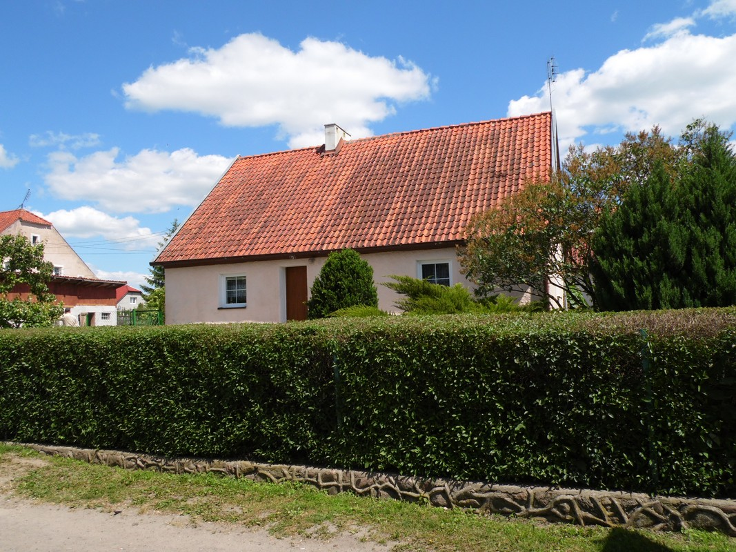 DOM MIESZKALNY.